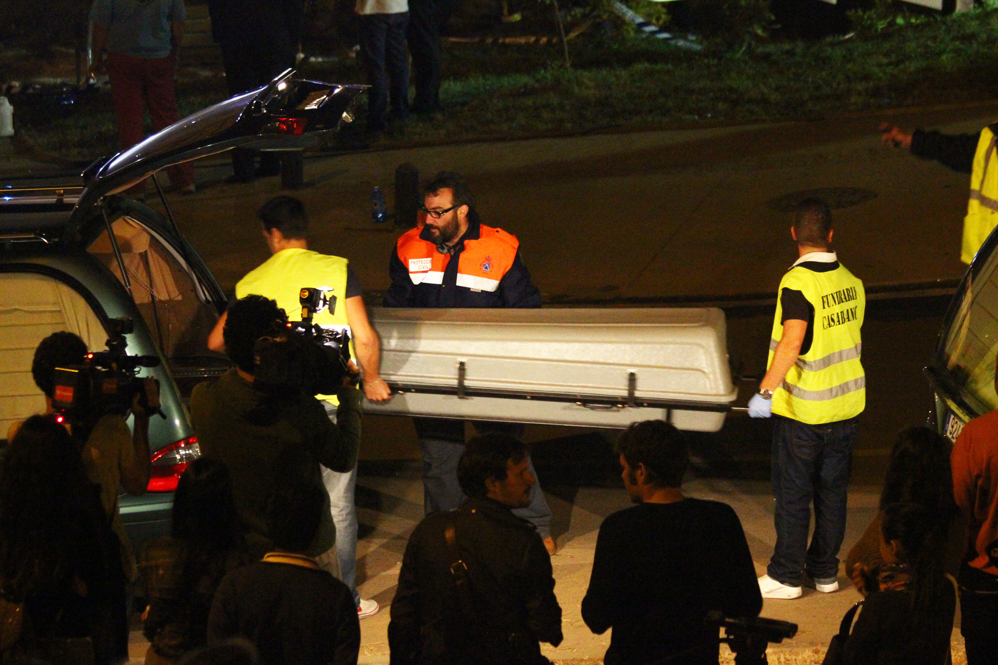 Fotos que hice in situ del accidente ferroviario ocurrido este 24 de julio cerca de Santiago de Compostela. En el momento de escribir estas líneas ya se cuentan 65 muertos. Es el peor accidente ferroviario de España en los últimos 40 años. Tragedy in Santiago de Compostela Photos I made on-site of the train crash on July 24 near Santiago de Compostela. At the time of writing are counted 65 dead. It is the worst rail accident in Spain in the last 40 years.